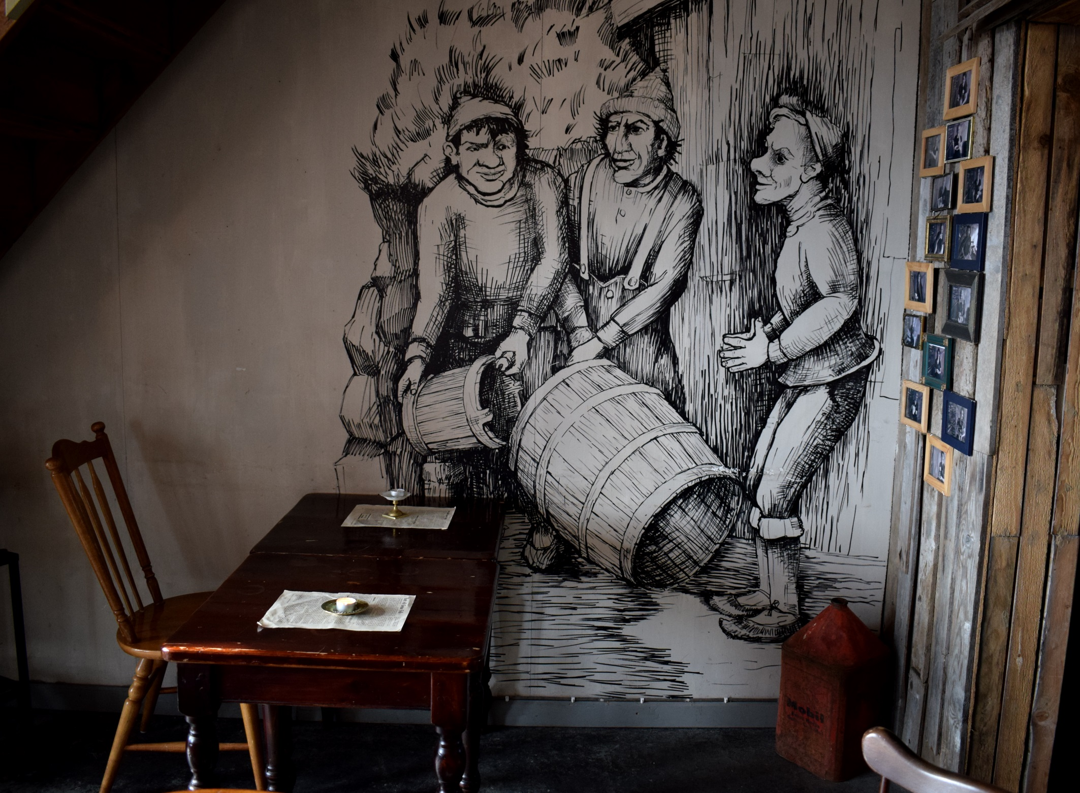 Bakkabræður, Gísli, Eiríkur og Helgi með kerald sitt. Veggmynd gerð eftir frummynd Eggerts Gíslasonar.